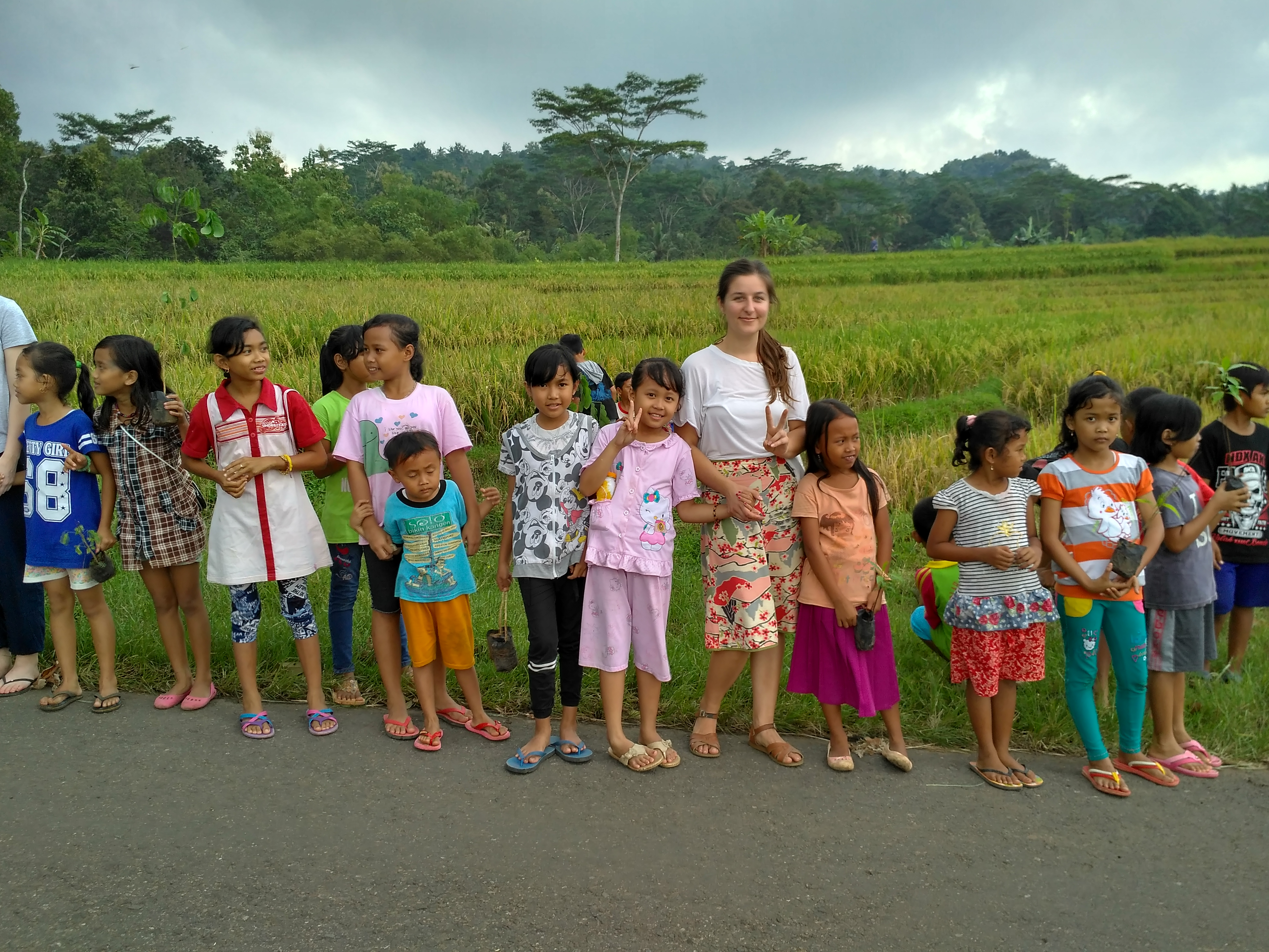 Salah satu pemandangan saat penanaman pohon di Desa Pentur